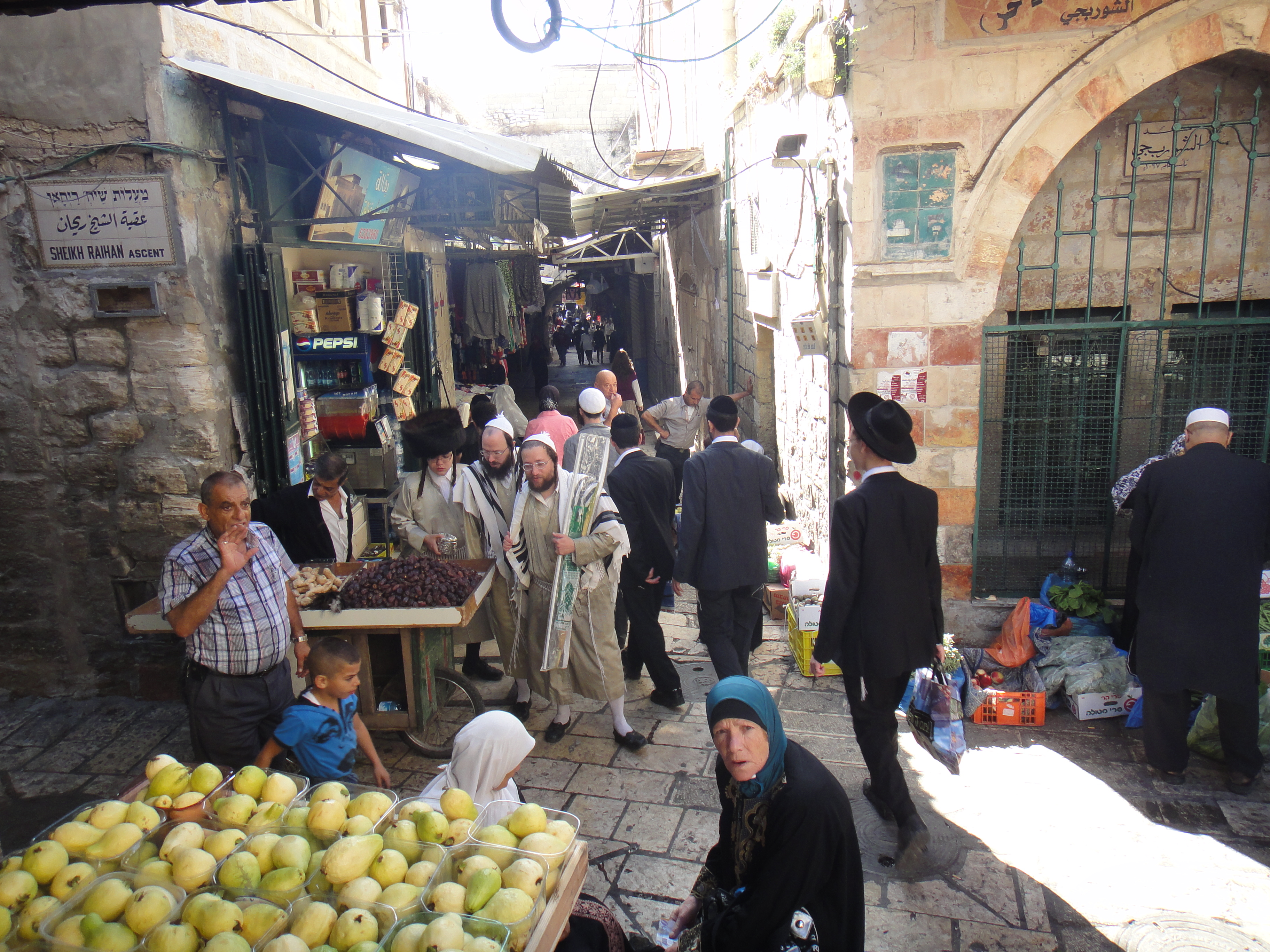 רחוב הגיא